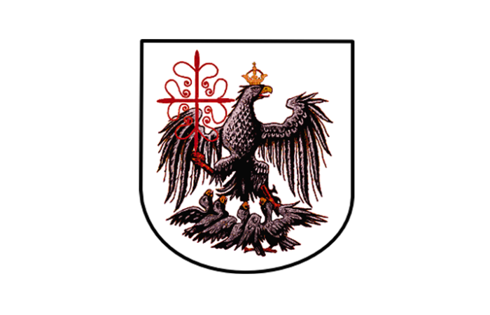 Bandera de la Ciudad de Buenos Aires. Vea también la Información histórica provista por el Gobierno de la Ciudad.